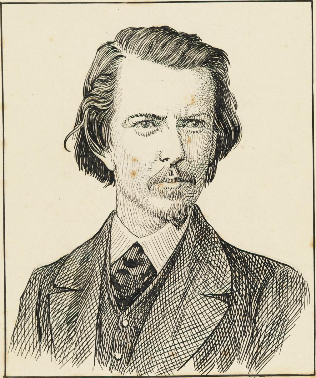 Fagundes Varella